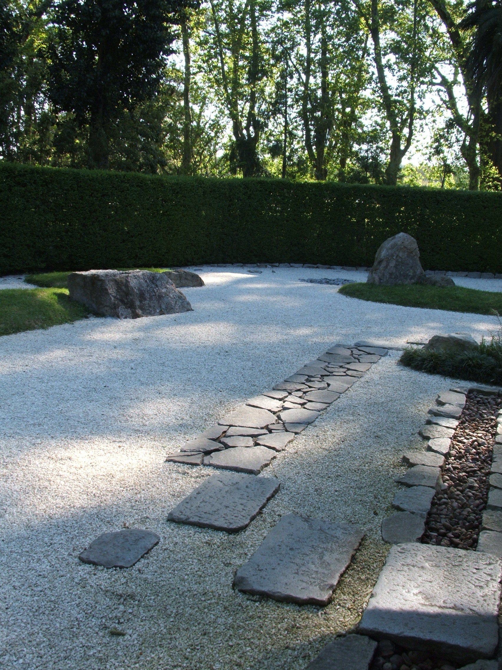 Jardín seco en el Jardín Japonés de Montevideo